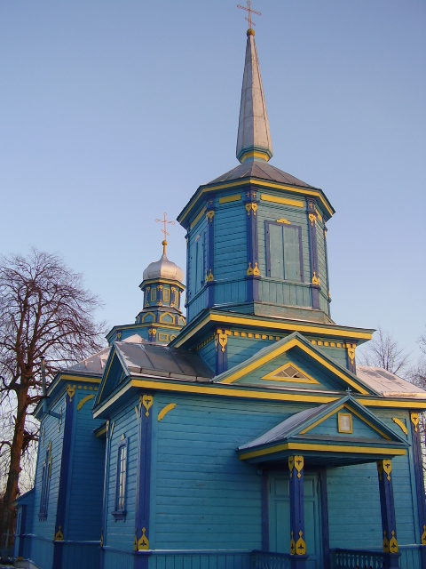 Православная церковь в д. Оздамичи